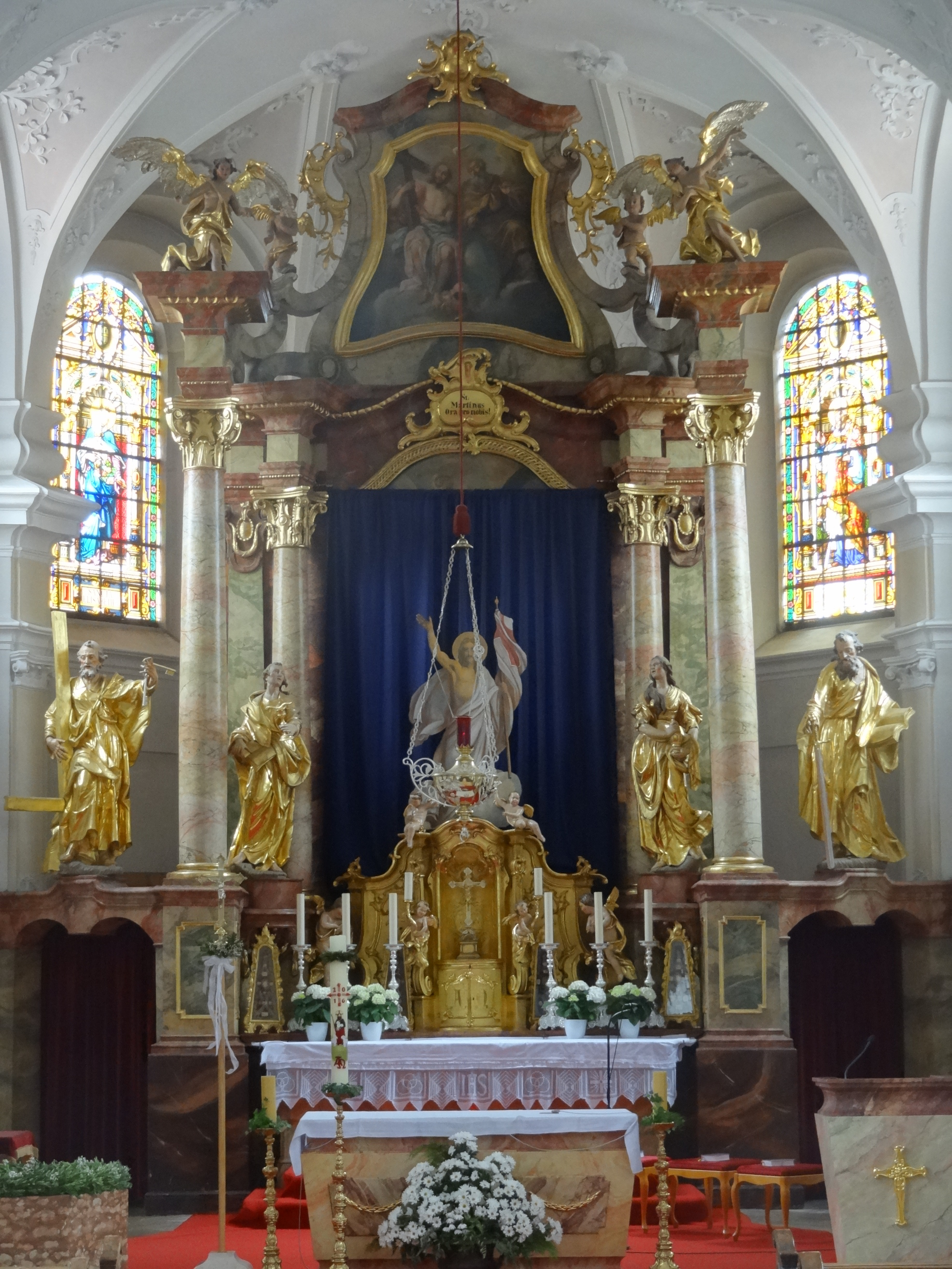 Hochaltar der Pfarrkirche St. Martin in Langenpreising (Landkreis Erding, Oberbayern)